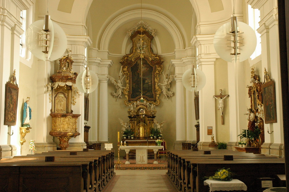 Interiér kostela sv. Antonína poustevníka v Hradci Králové.